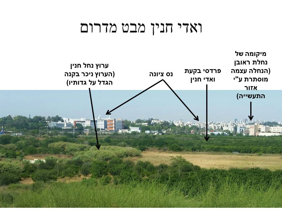 מזרח ואדי חנין, מבט מדרום, בחזית הנחל והפרדסים בבקעה בעורף נס ציונה